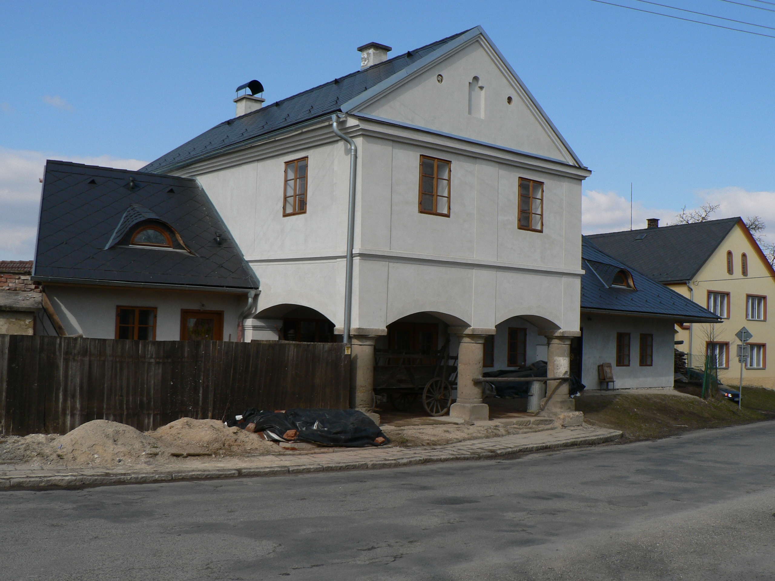 Kovárna s podloubím (čp. 36), lidová stavba z 1. poloviny 19. století v Doubravici, okres Šumperk.